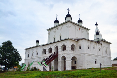 Анастасов монастырь, Одоевский район